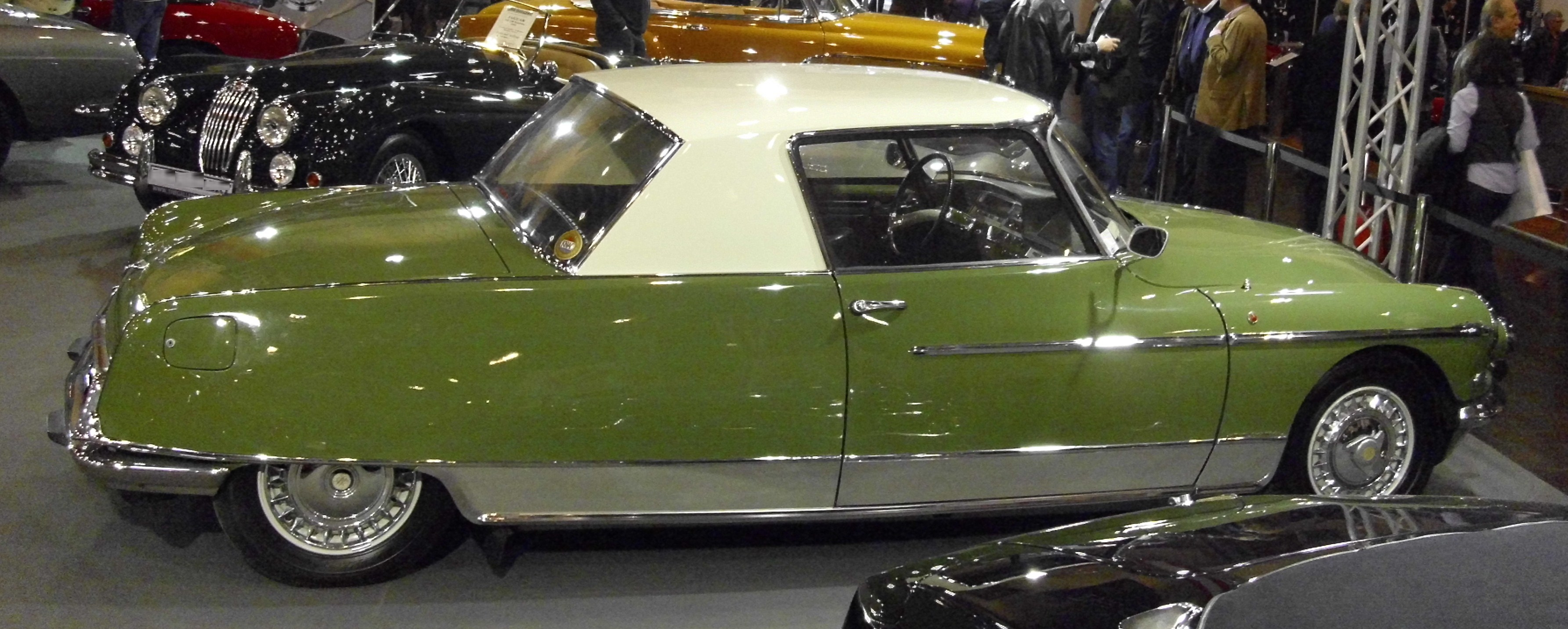 Citroën DS 21 Coupé Le Dandy von Chapron 1961